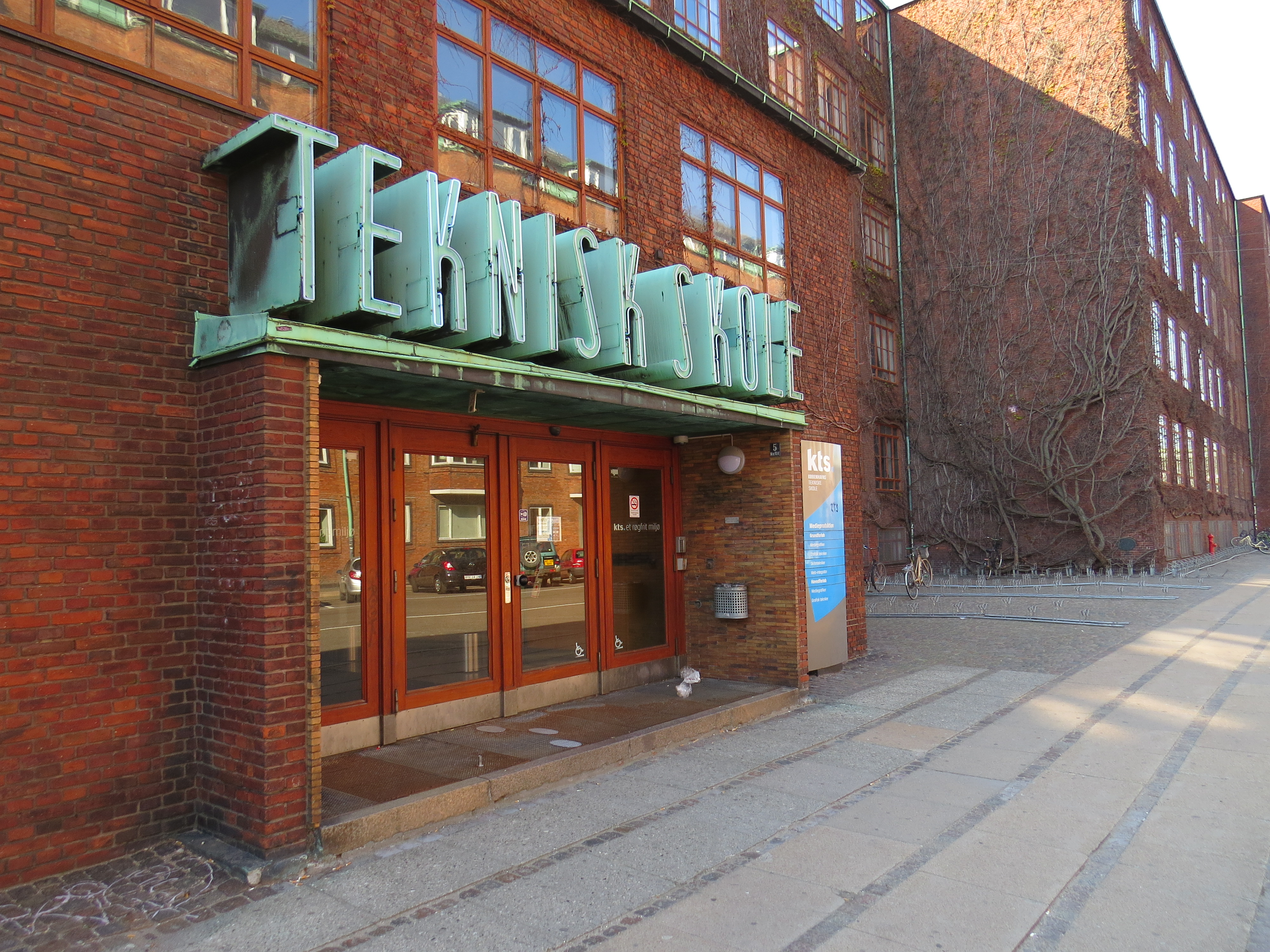 Teknisk skole, Julius Thomsens Gade, Frederiksberg C